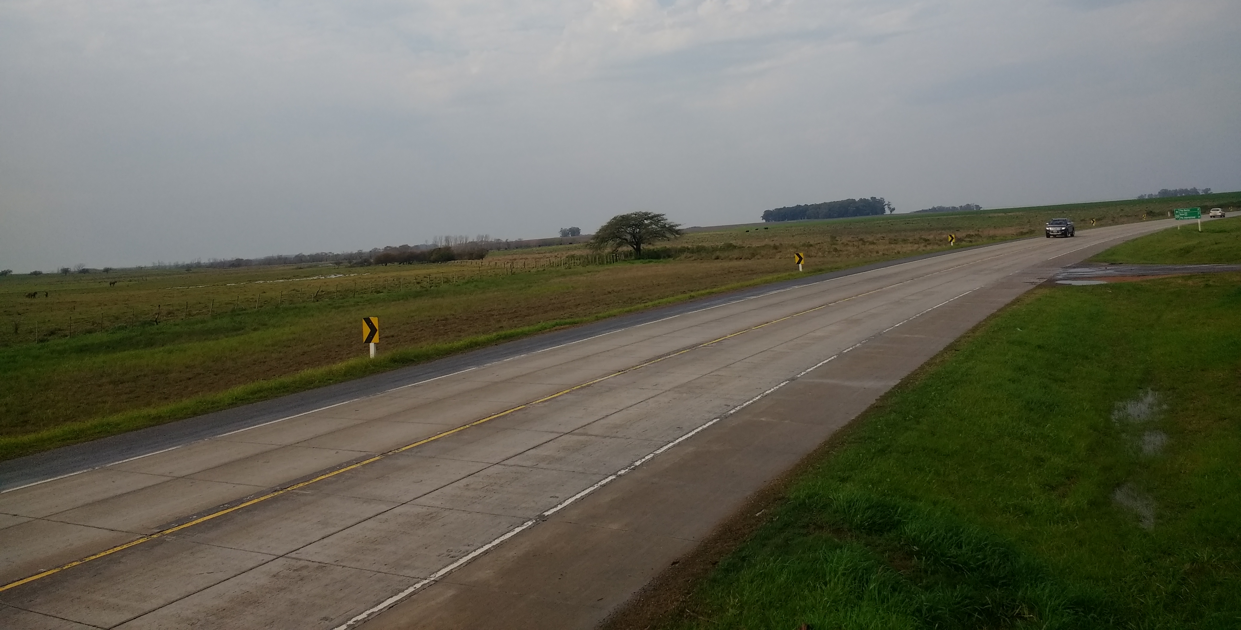 Ruta 24 en el departamento de Río Negro, Uruguay.